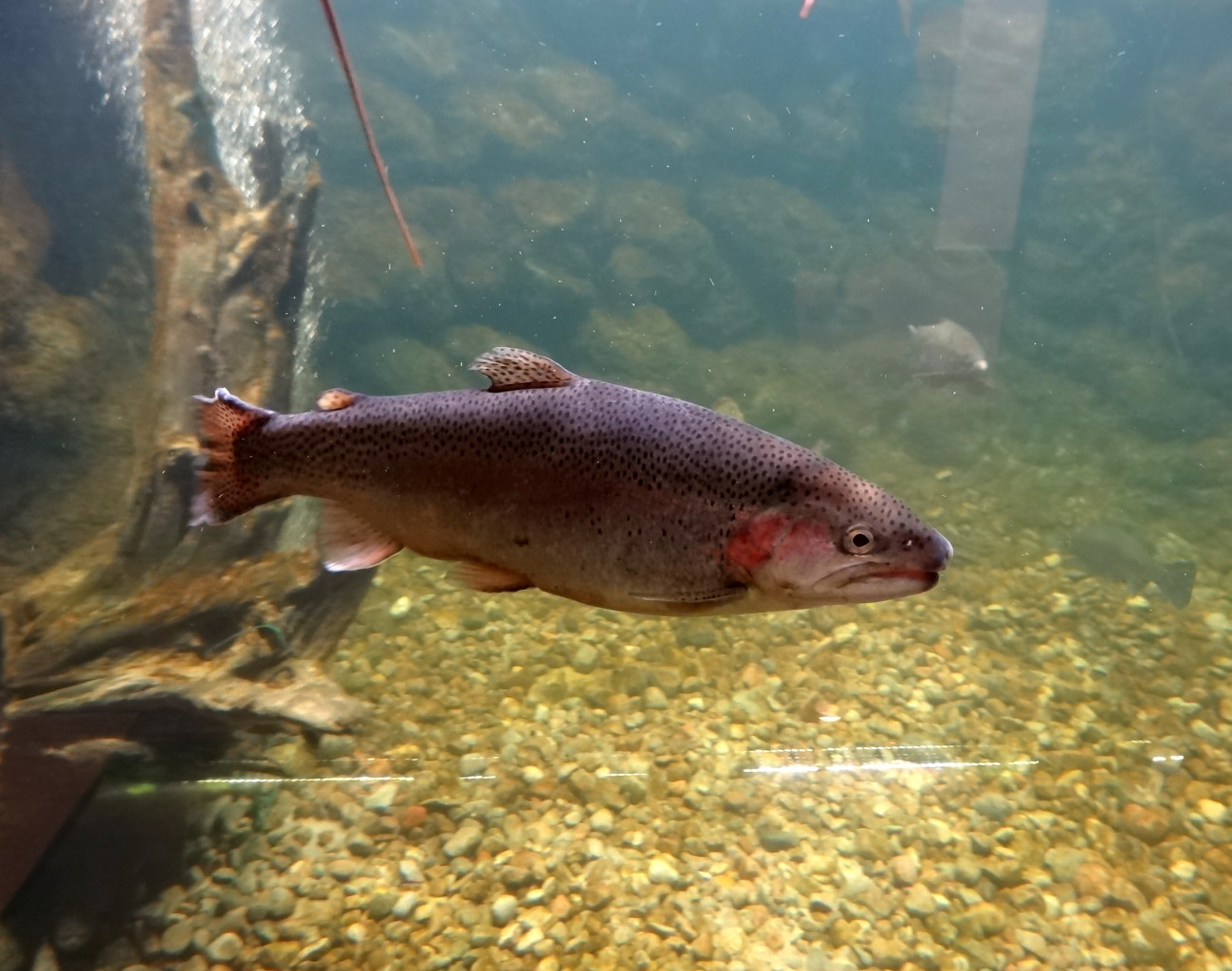 Akwarium (Wisłarium) w Ogrodzie Zoologicznym w Bydgoszczy-Myślęcinku